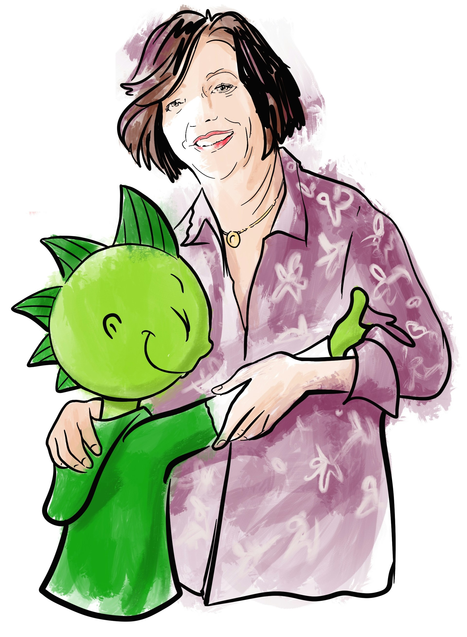 Jolinchen umarmt seine „Mutter“ (Jolinchen mit der Redakteurin Gabriele Wolff-Starck, die den Charakter aufgebaut und 35 Jahre geführt hat. Ein Dankeschön- Portrait von Stefan Müller.)